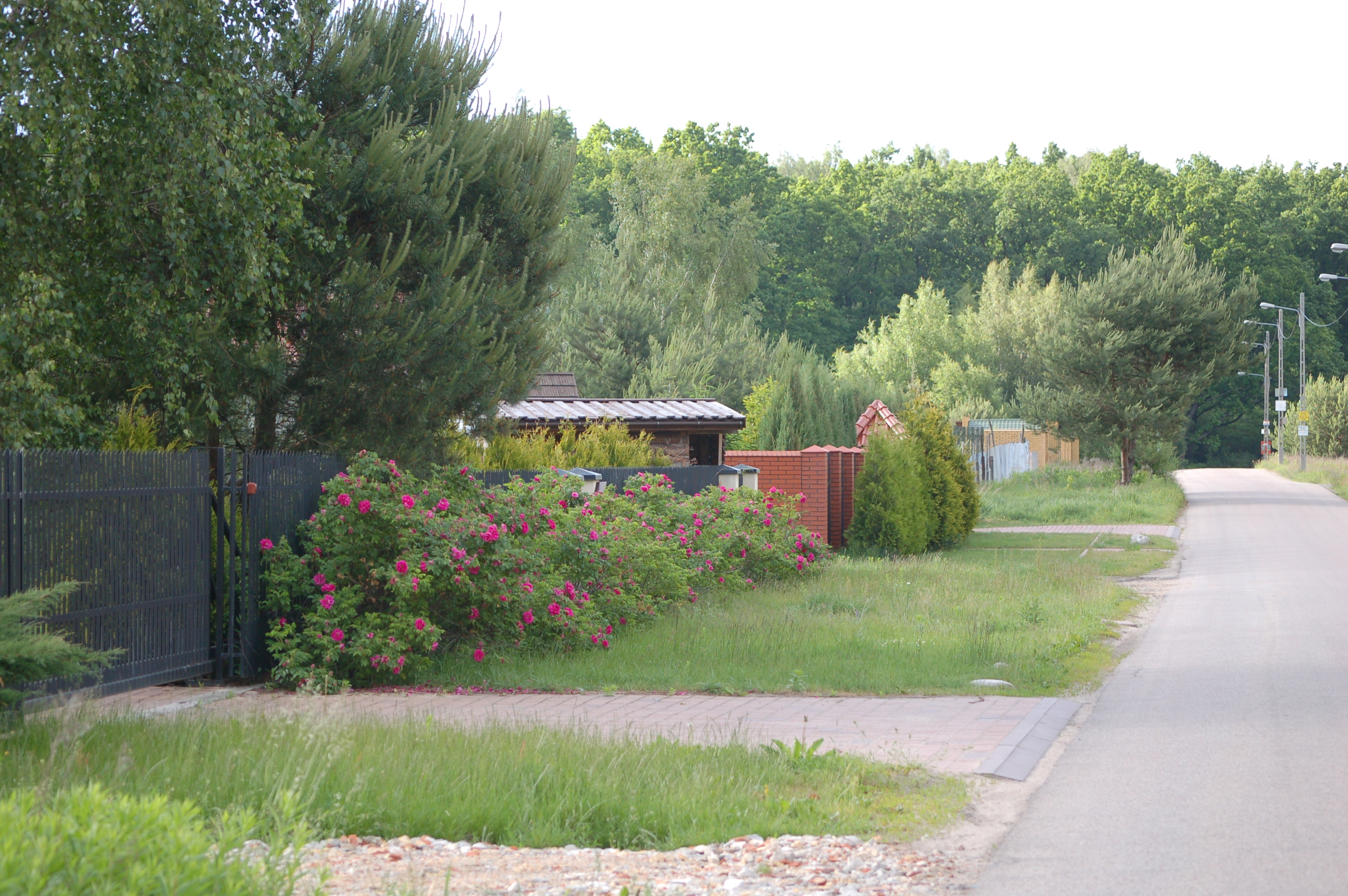 ul. Ornecka